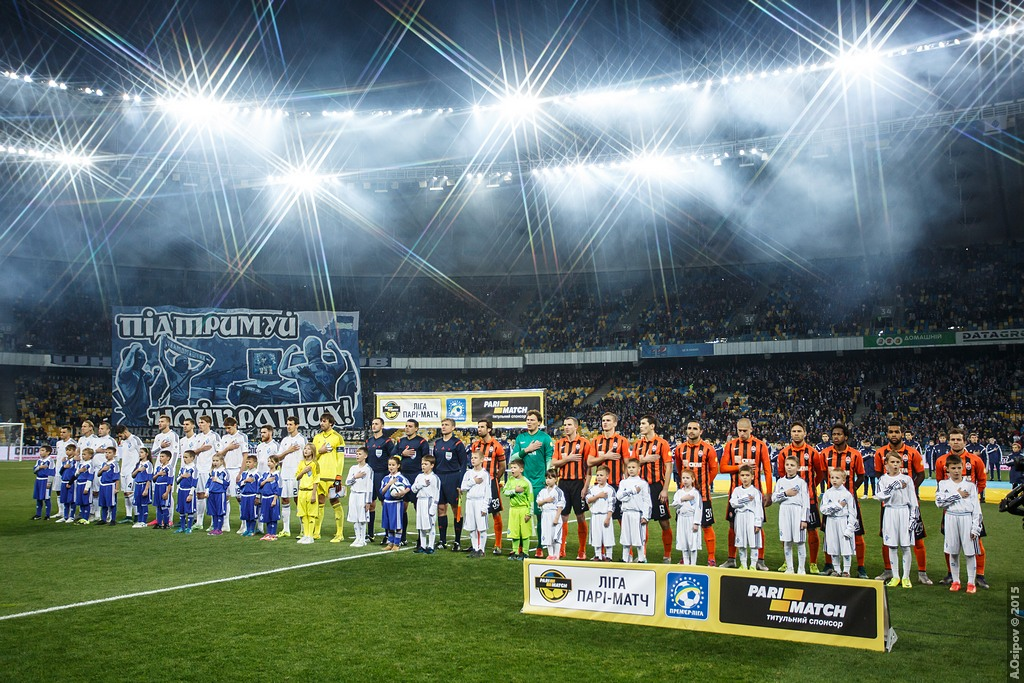 16.10.2015 г.Киев. НСК "Олимпийский". 11-й тур Лиги Пари-Матч. Динамо Киев - Шахтер Донецк - 0:3